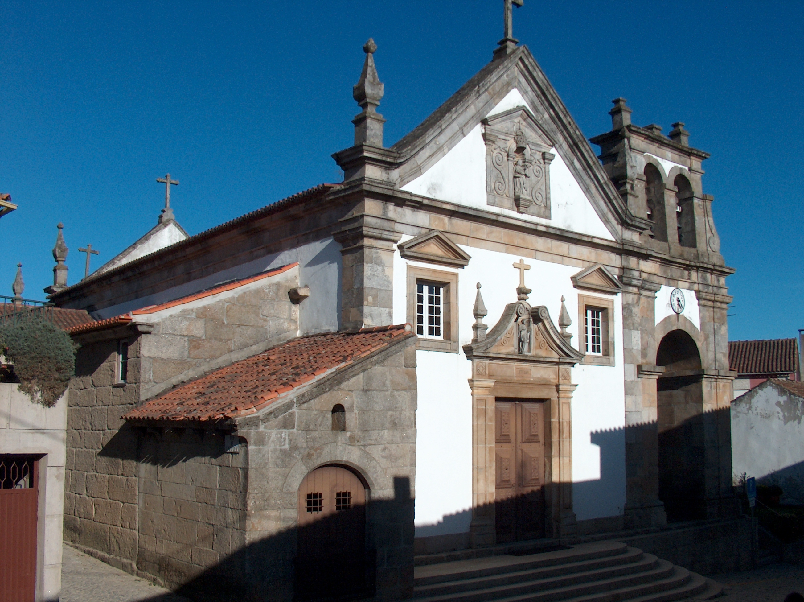 Igreja de Constantim (incluindo as capelas anexas e o altar-mor de talha com sacrário giratório)